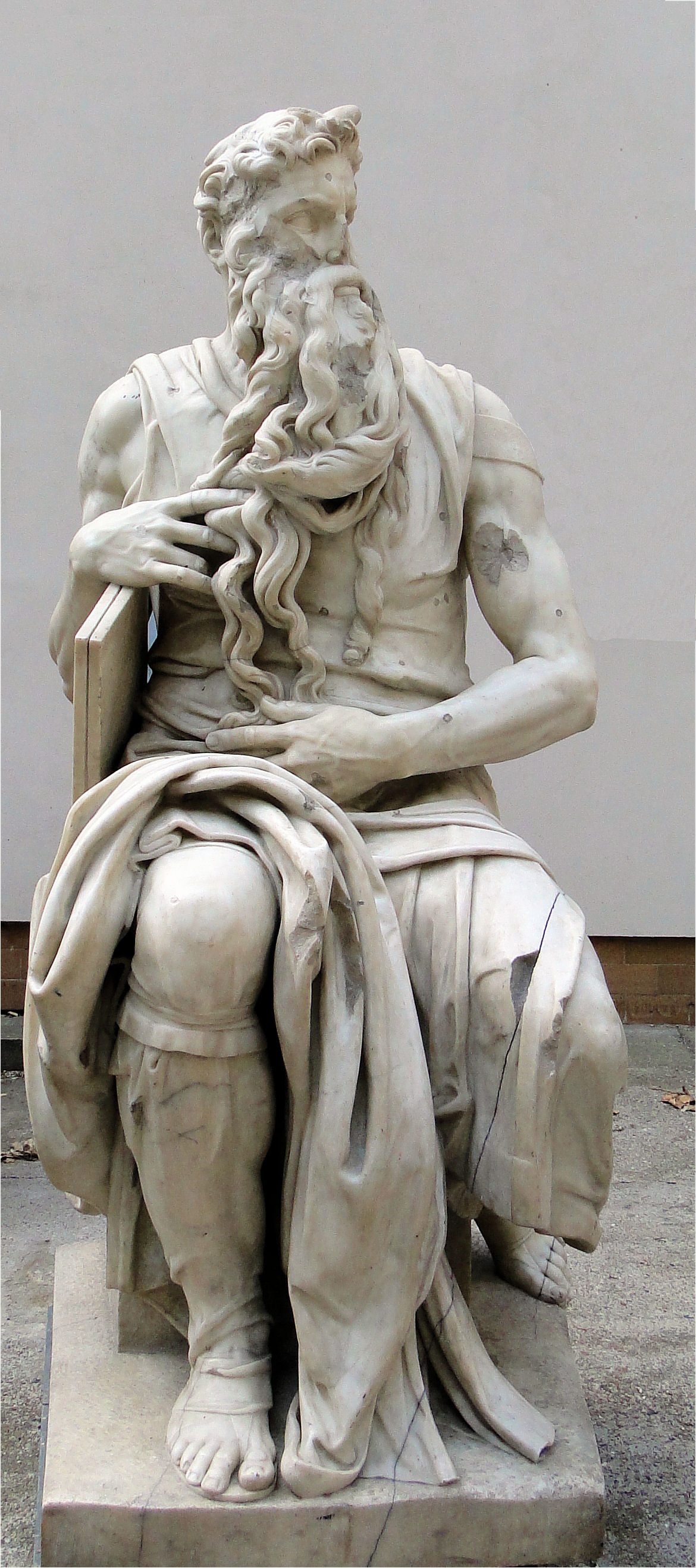 Posąg Mojżesza - kopia dzieła Michała Anioła wykonana przez Bernharda Bleekera w 1911. Stan w 2014 r. (widoczne liczne ubytki (nos, broda), pęknięcia oraz ślady po kulach.